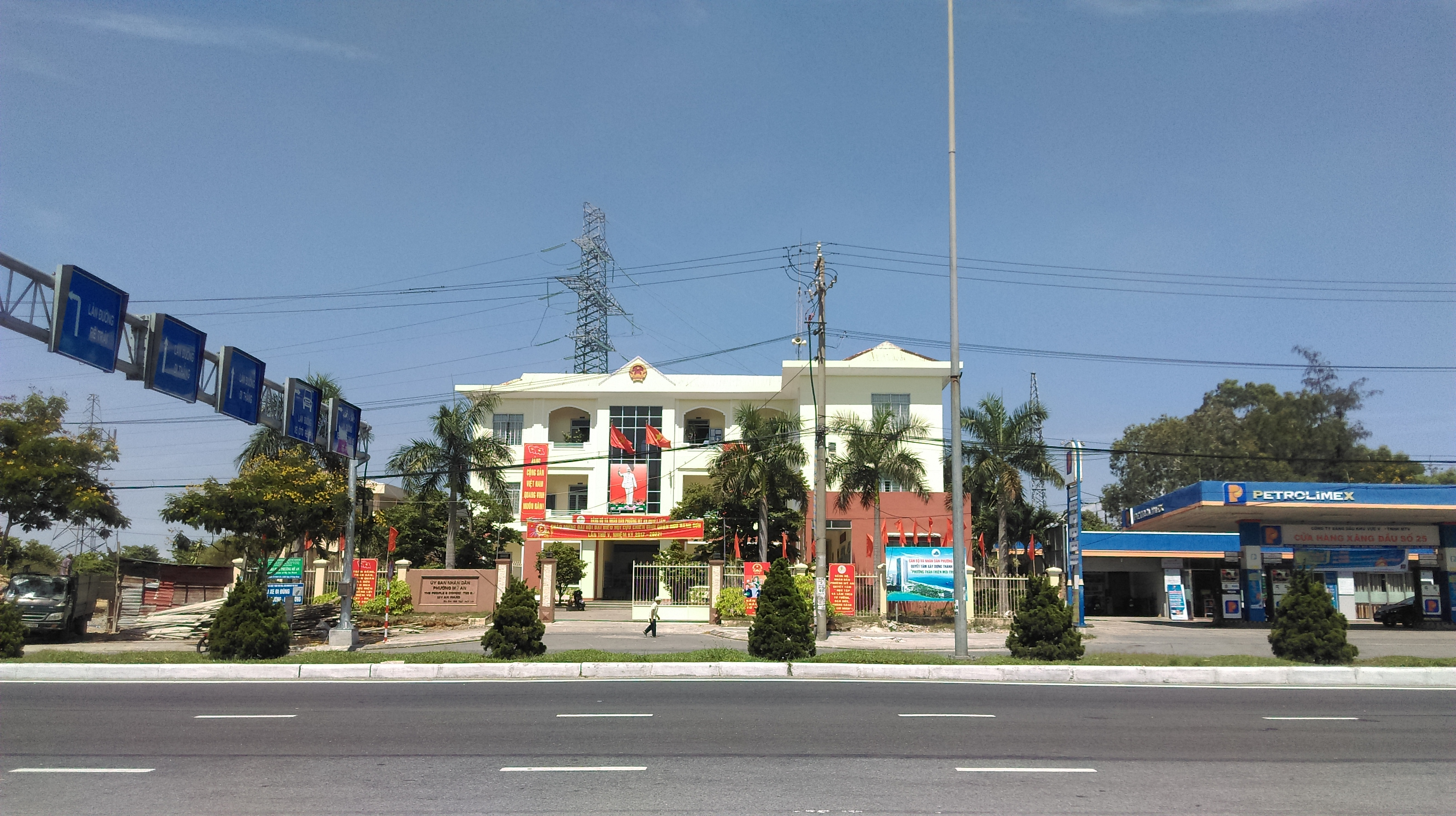 UBND phường Mỹ An, Ngũ Hành Sơn, Đà Nẵng